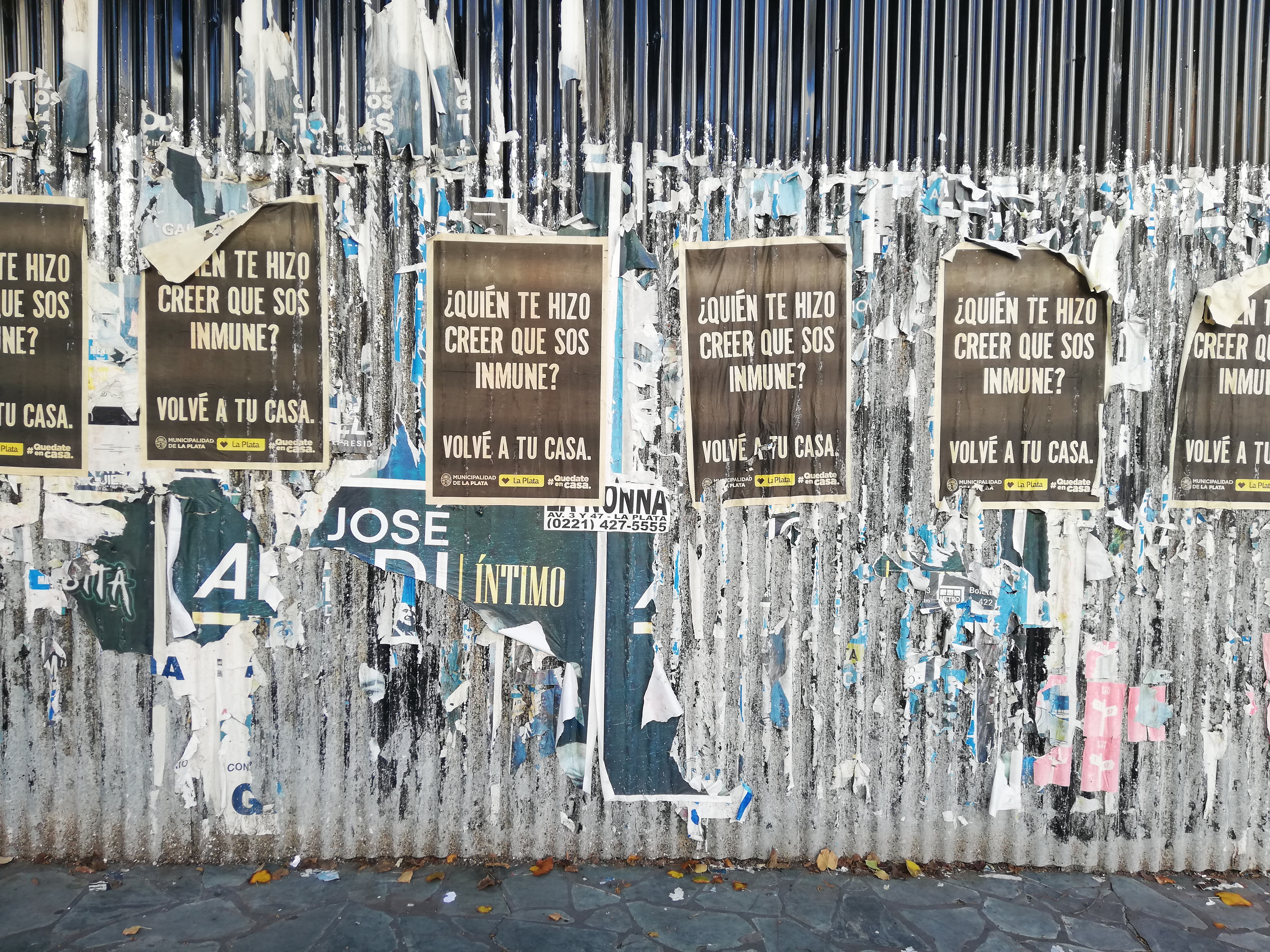 Afiches de la municipalidad de la ciudad de La Plata (Argentina) exigiendo se respete la cuarentena quedándose los ciudadanos en la casa